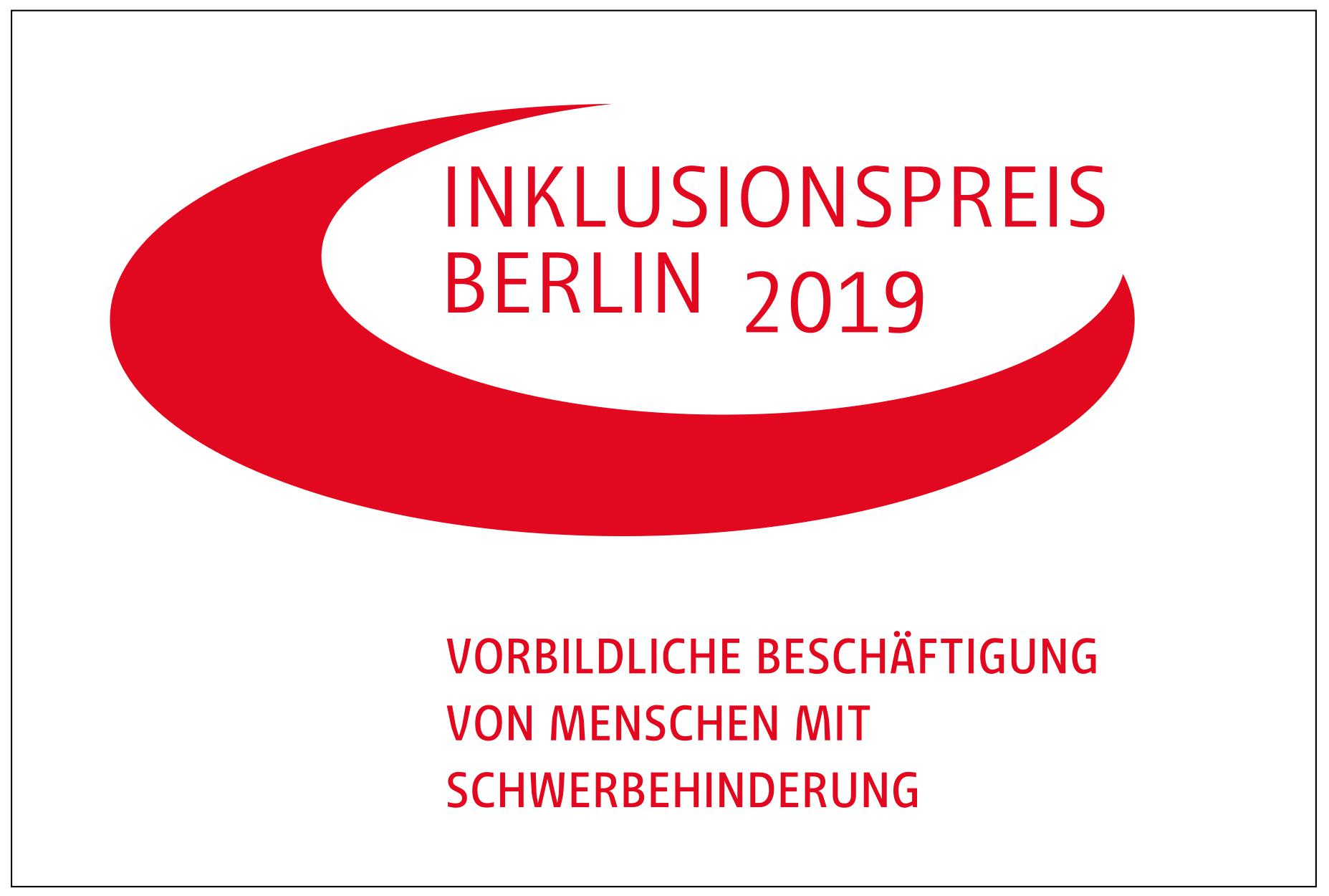 Offizielles Logo zum Inklusionspreis Berlin